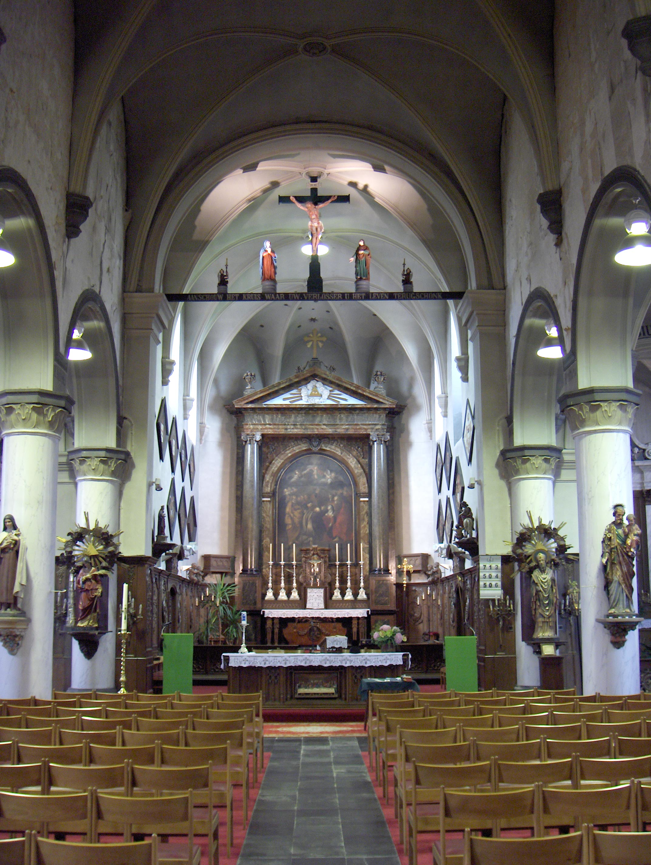 Strijtem, Ortsteil der Gemeinde Roosdaal (Belgien, Prov. Flämisch-Brabant), Martinikirche